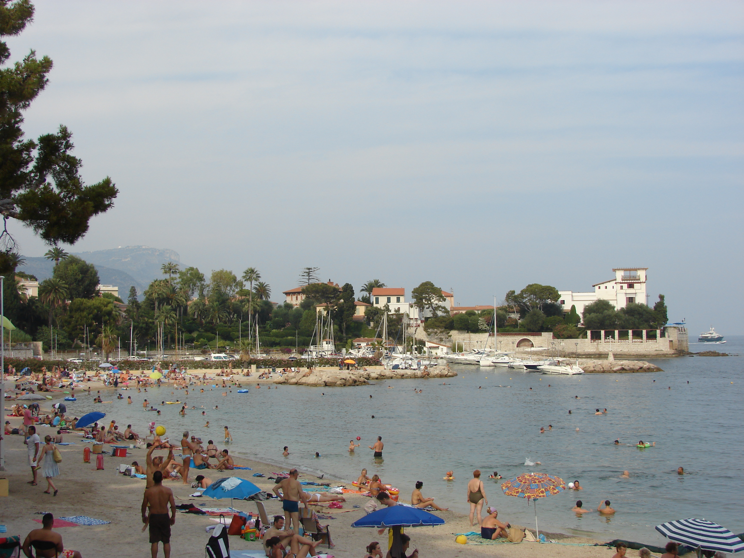 Baie des Fourmis, Beaulieu-sur-Mer, Provence-Alpes-Côte d'Azur, France